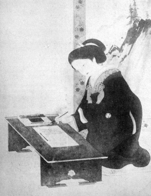 a Japanese woman 和宮親子内親王 (Kazunomiya)